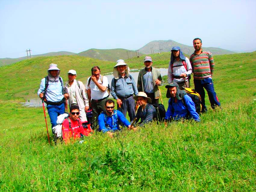 تصویر یادگاری از کوهنوردان آزنا کنار برکه قالغانلو در شرق روستای خان کندی گرمی مغان